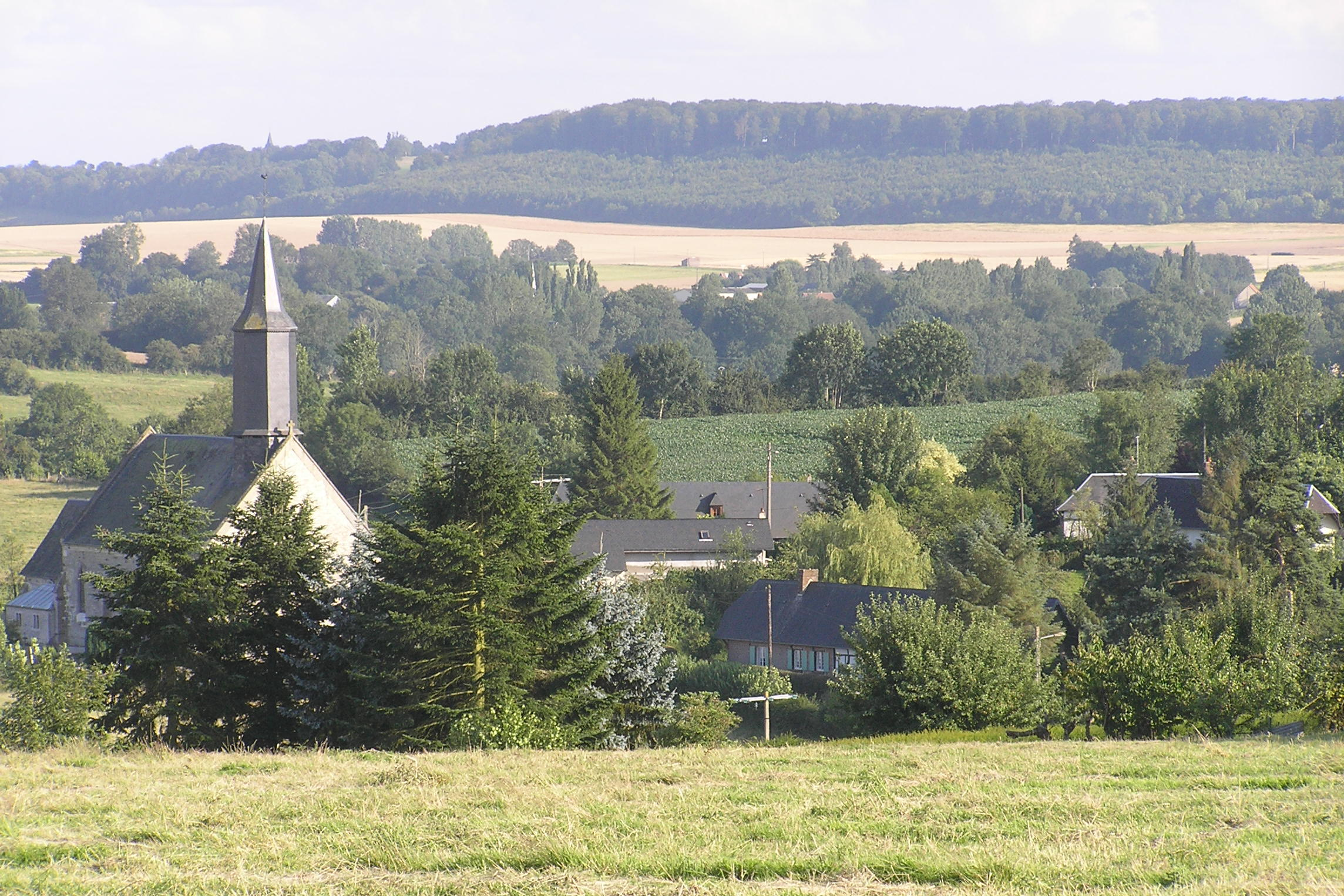 Vue d'ensemble du centre de Mesangueville